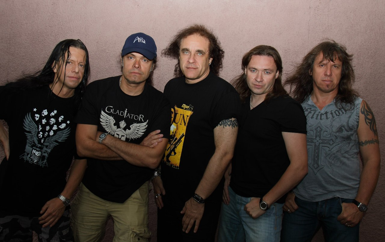 Группа Ария 2013 год